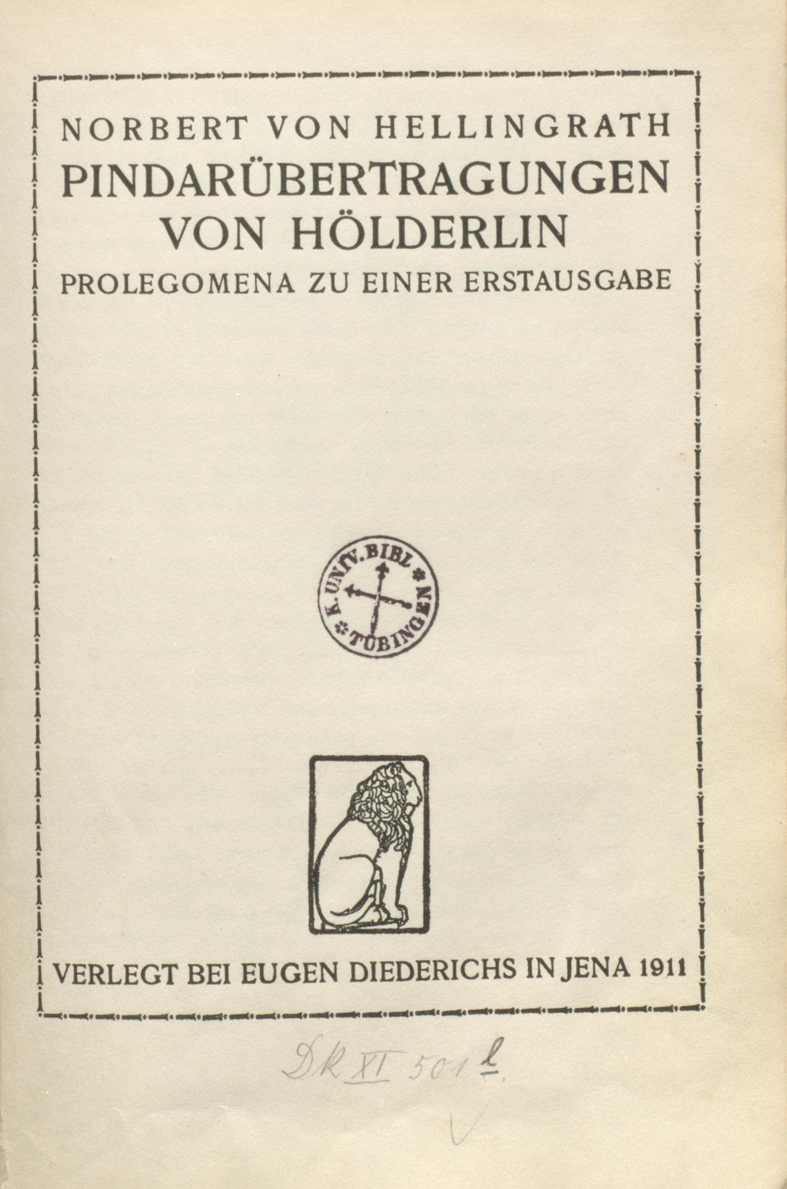 Norbert von Hellingrath: Pindarübertragungen von Hölderlin, Titelseite von 1911